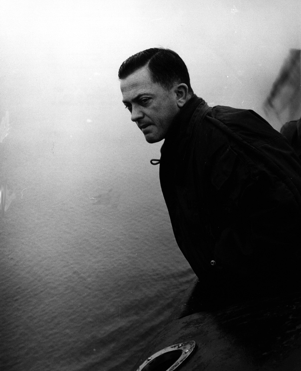 William Robert Anderson from [1]